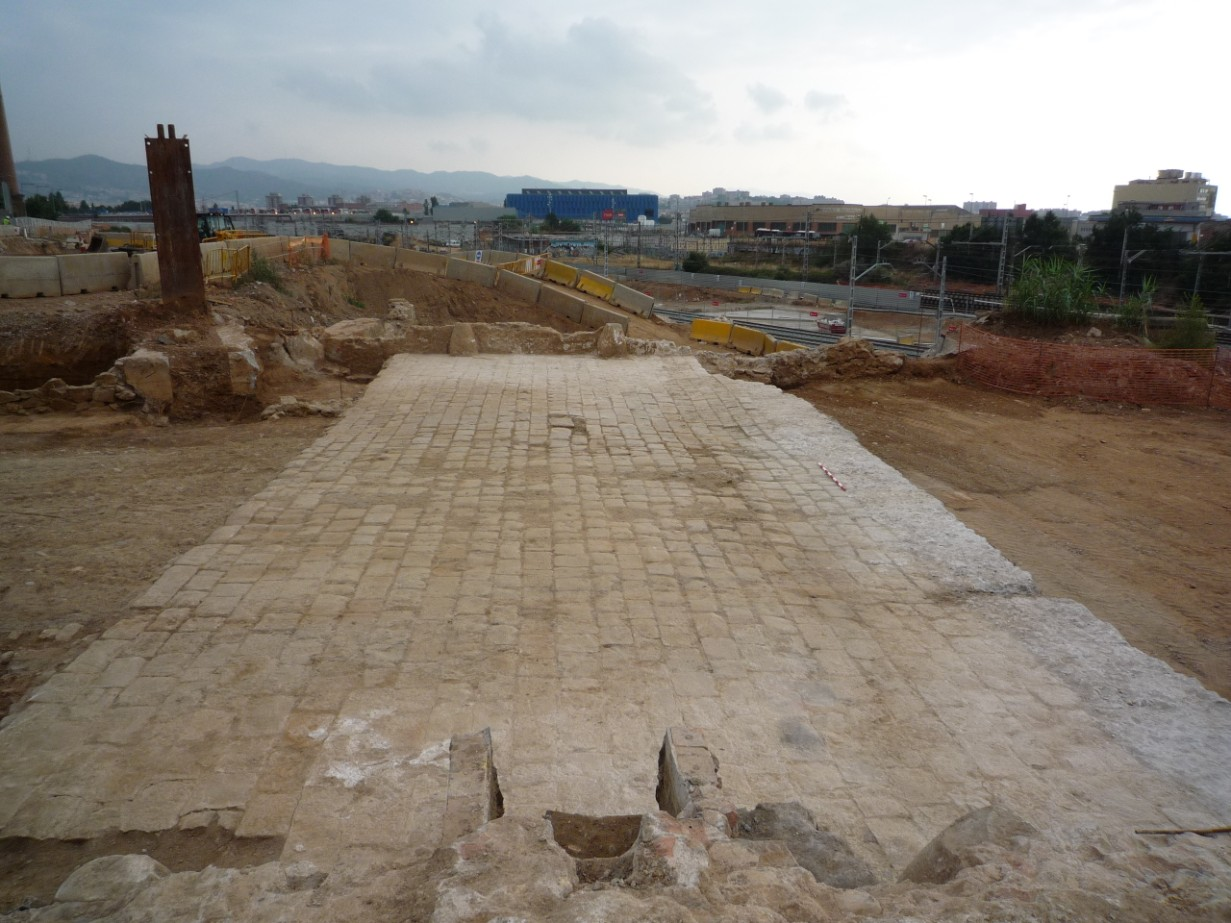 Vista general de la part superior del pont del carrer de la Riera d'Horta. Foto: Estíbaliz Monguiló